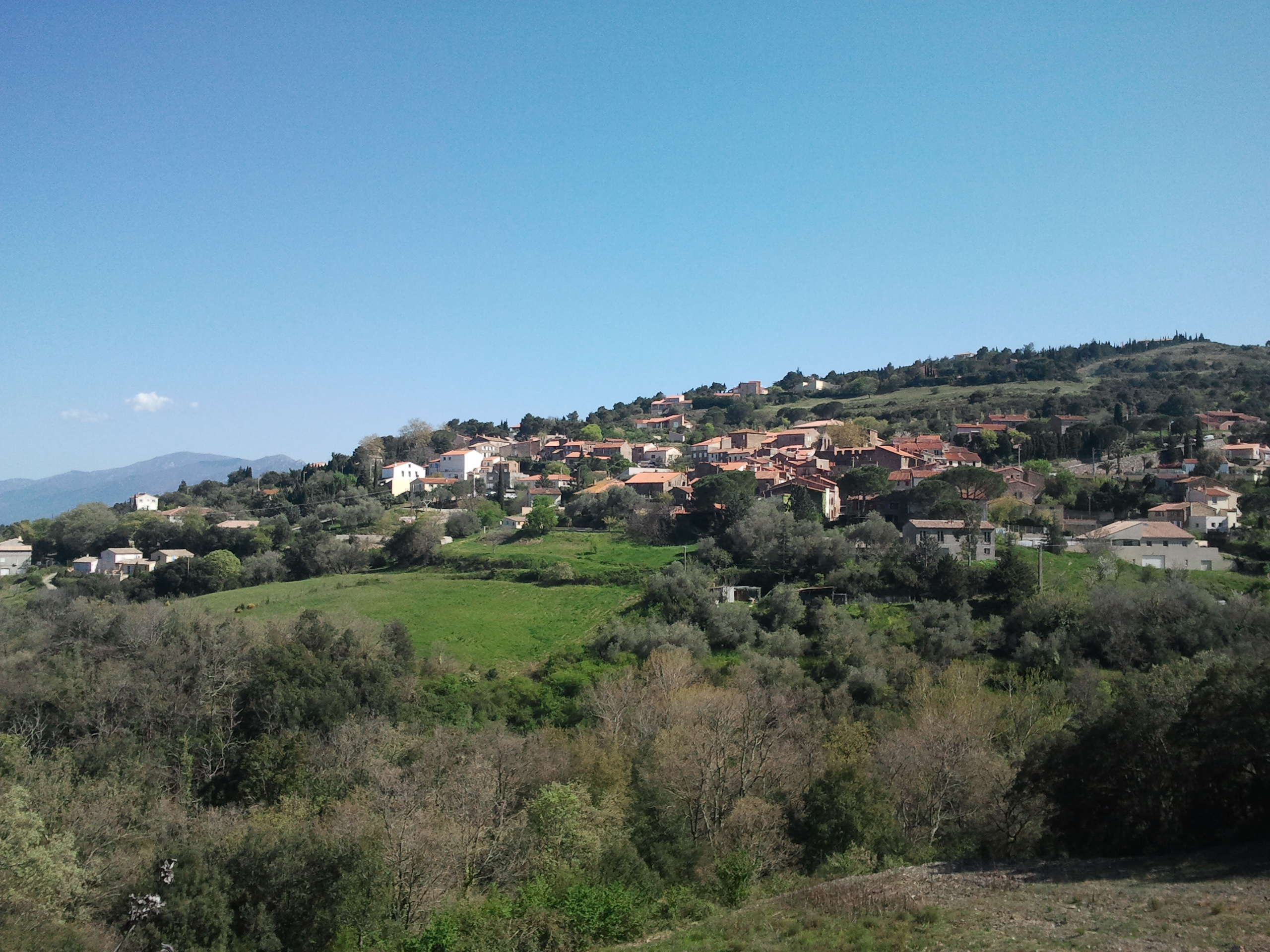 Vue générale de Llauro